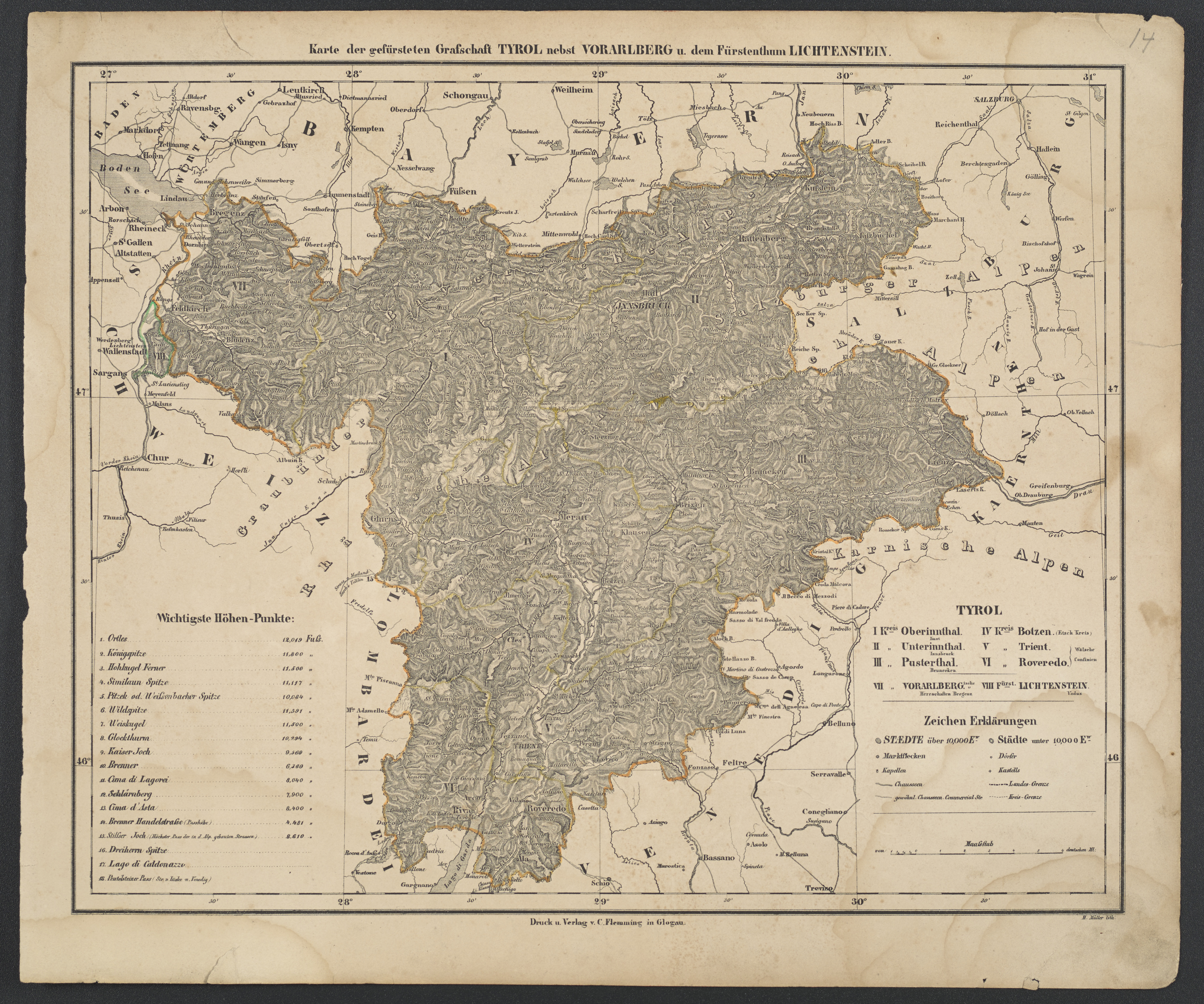 1 Kt. : Grenzen kolor. (38 x 31 cm); Koordinaten E 9°18'00"-E 13°23'00"/N 47°50'00"-N 45°38'00" ; In: Vollständiger Hand-Atlas der neueren Erdbeschreibung ueber alle Theile der Erde / herausgegeben von K. Sohr. - Maßstab in graph. Form (deutsche Ml.). - Titel oberhalb des Kt.-Feldes. - Maßstab u. Erkl. der Zeichen unten rechts. - Mit Höhenangaben. - Relief: Schraffen